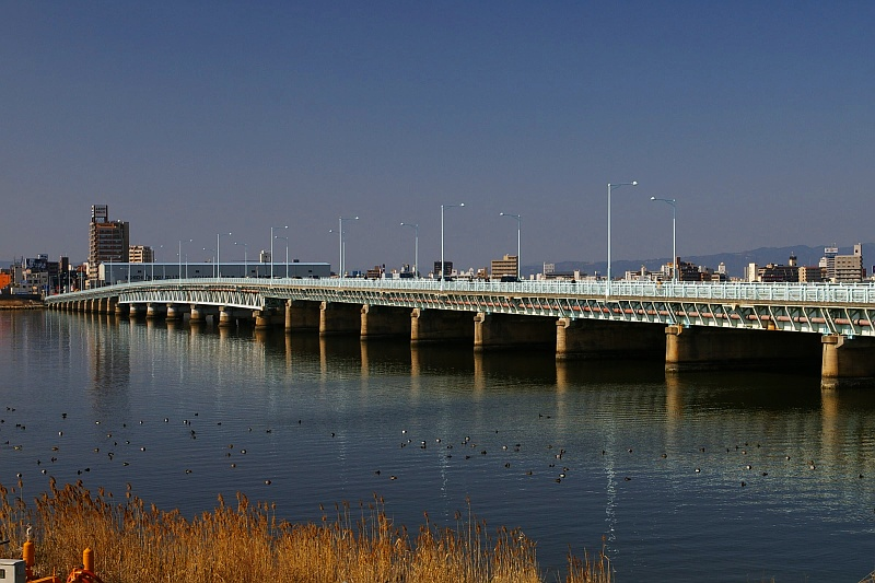 Yodogawa Ohashi (bridge), Osaka City, Japan.